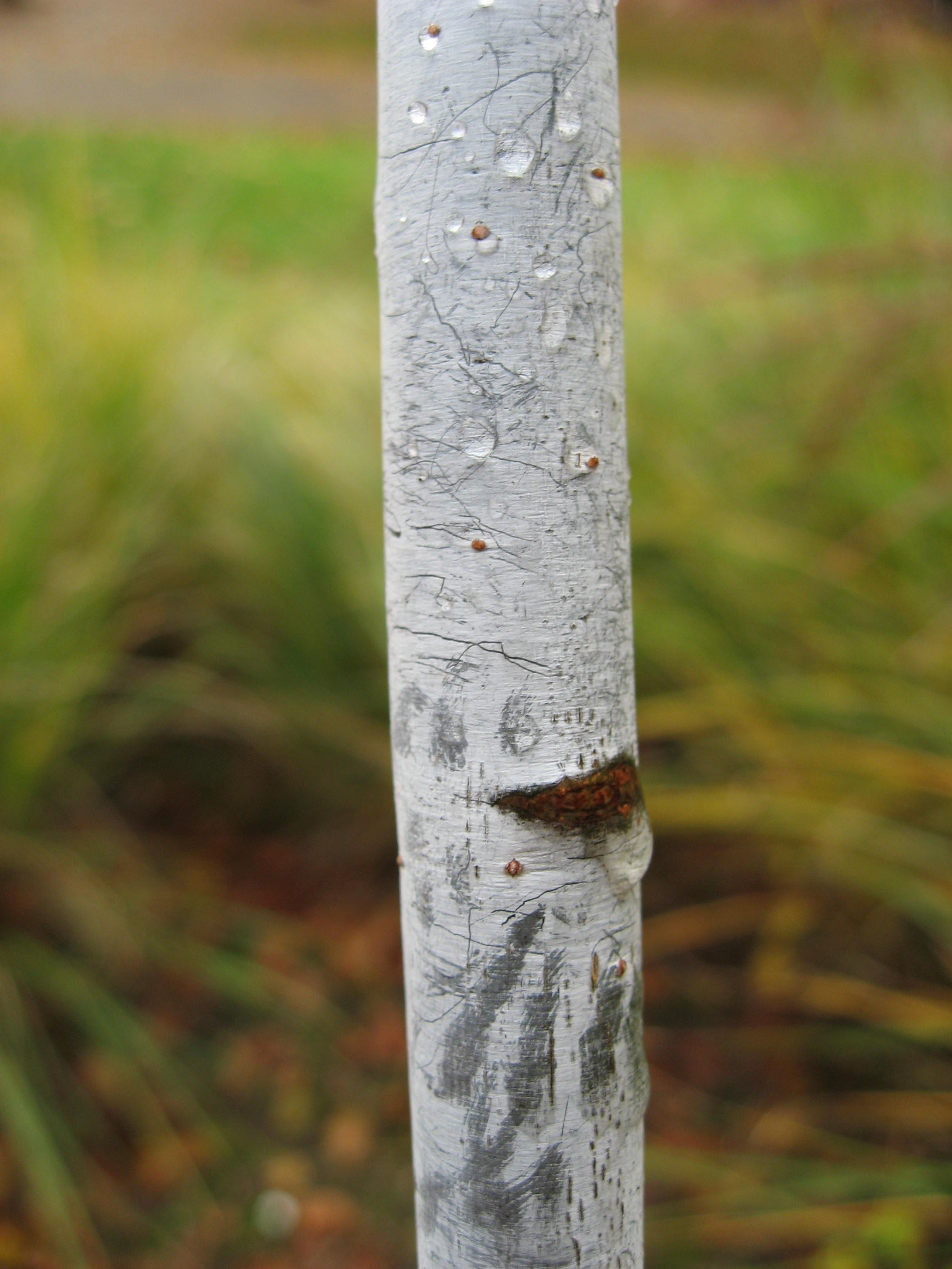 Salix udensis 'Sekka' in Parc floral de Paris Map: 48° 50' 19" N 2° 26' 33" E